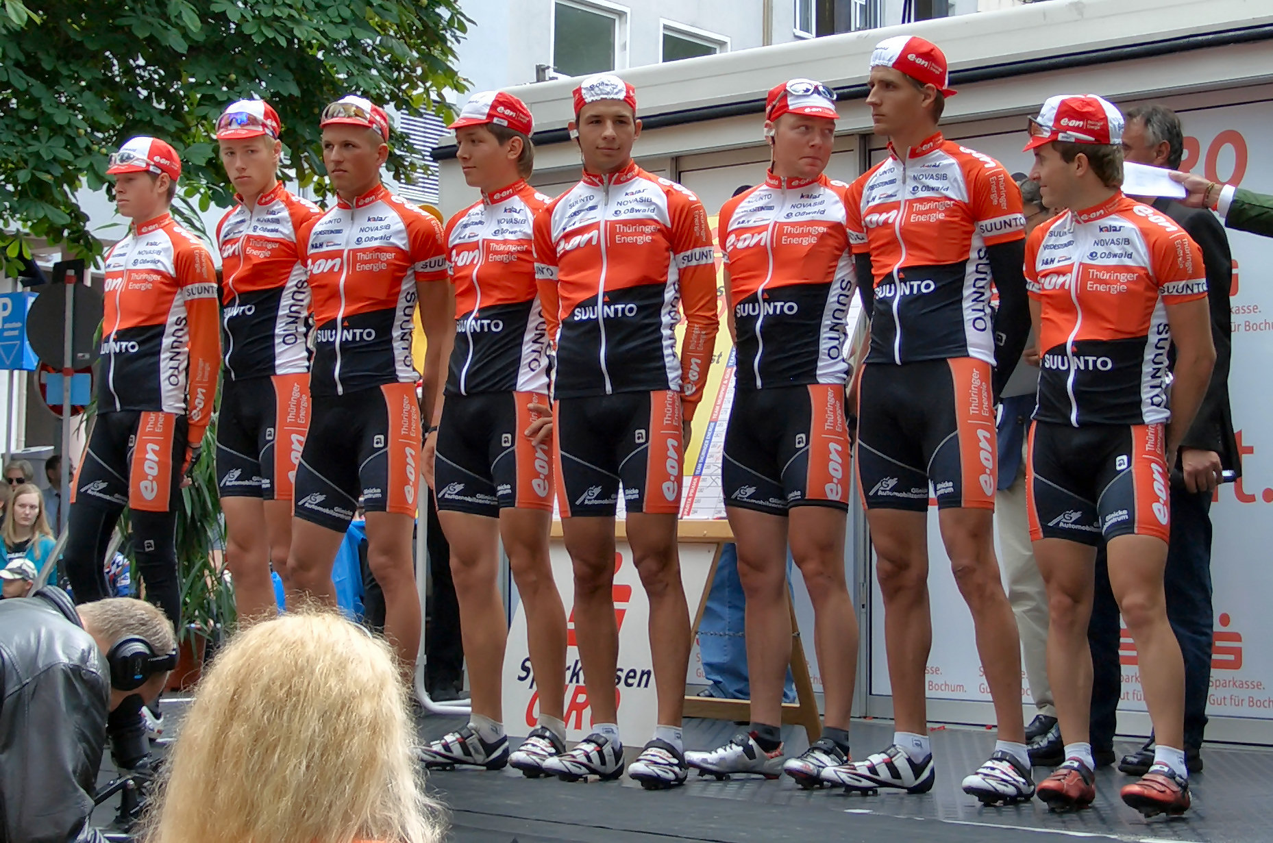 Thüringer Energie Team at Sparkassen Giro Bochum